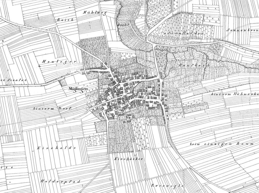 Möglingen auf der württembergischen Urflurkarte von 1831, Composit der Blätter NO XXXVI/5+6